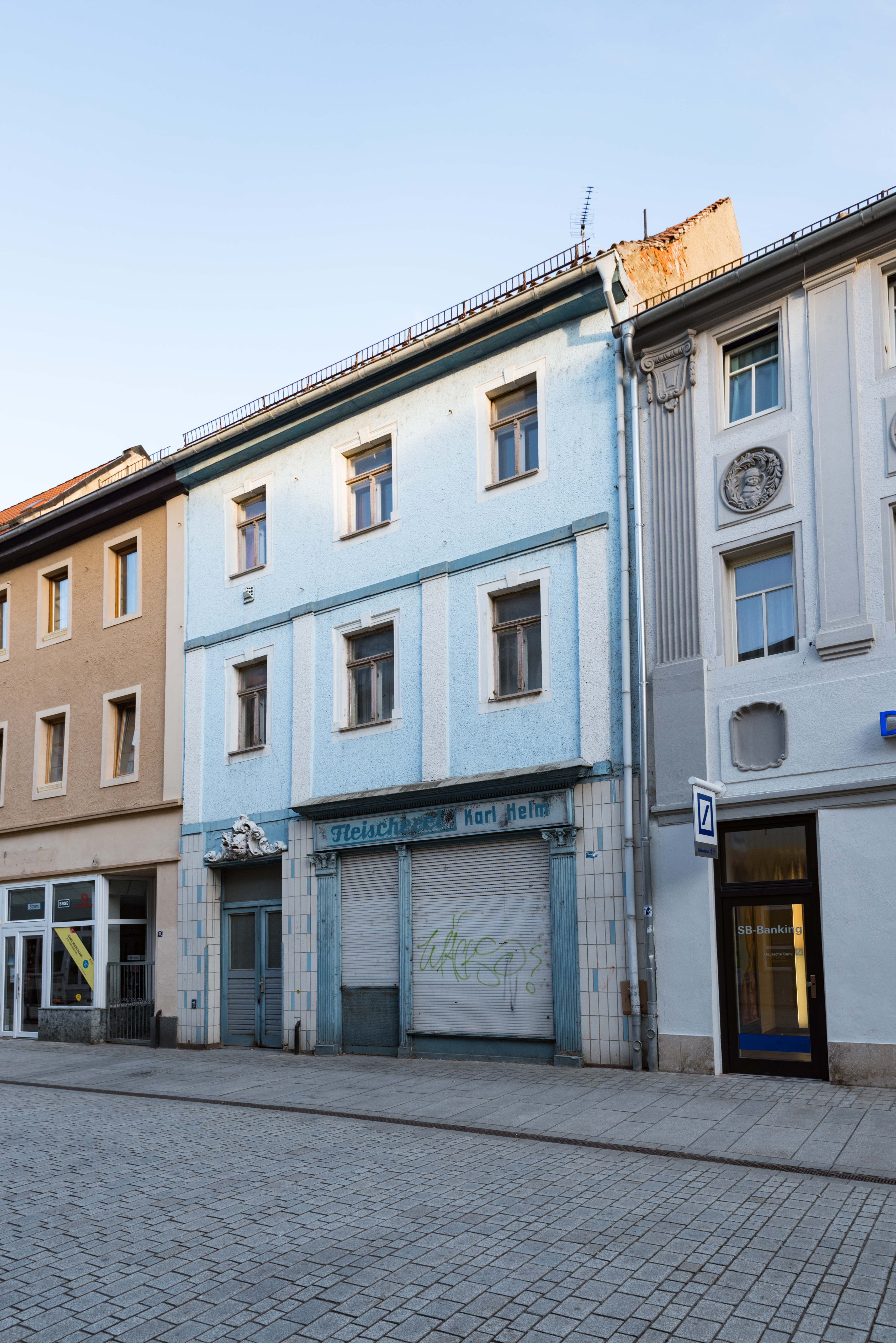 Weißenfels, Jüdenstraße 46